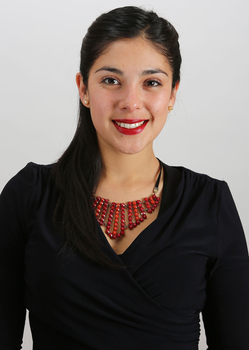 Karol Cariola Oliva